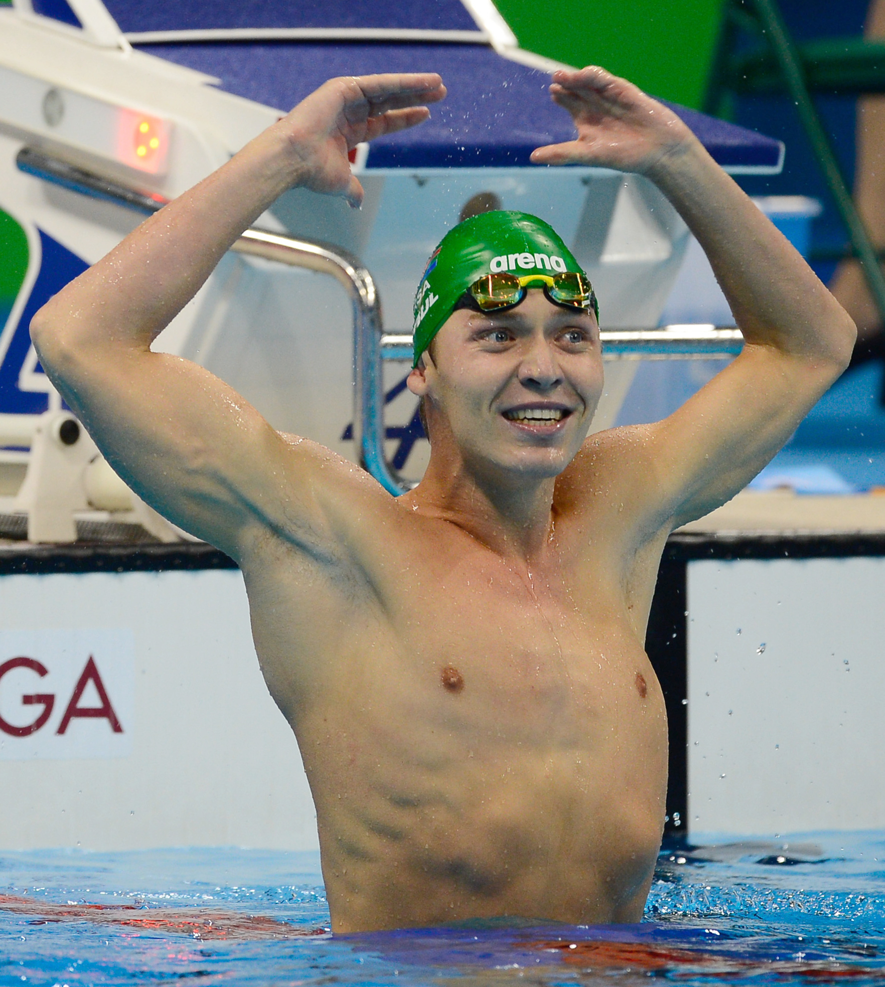 Rio de Janeiro - Kevin Paul, da África do Sul, medalha de ouro os 100m nado peito SB9 nos Jogos Paralímpicos Rio 2016, no Estádio Aquático. (Fernando Frazão/Agência Brasil)